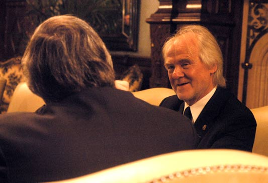 Néstor Kirchner recibe en el despacho presidencial a Juan Carlos Blumberg.